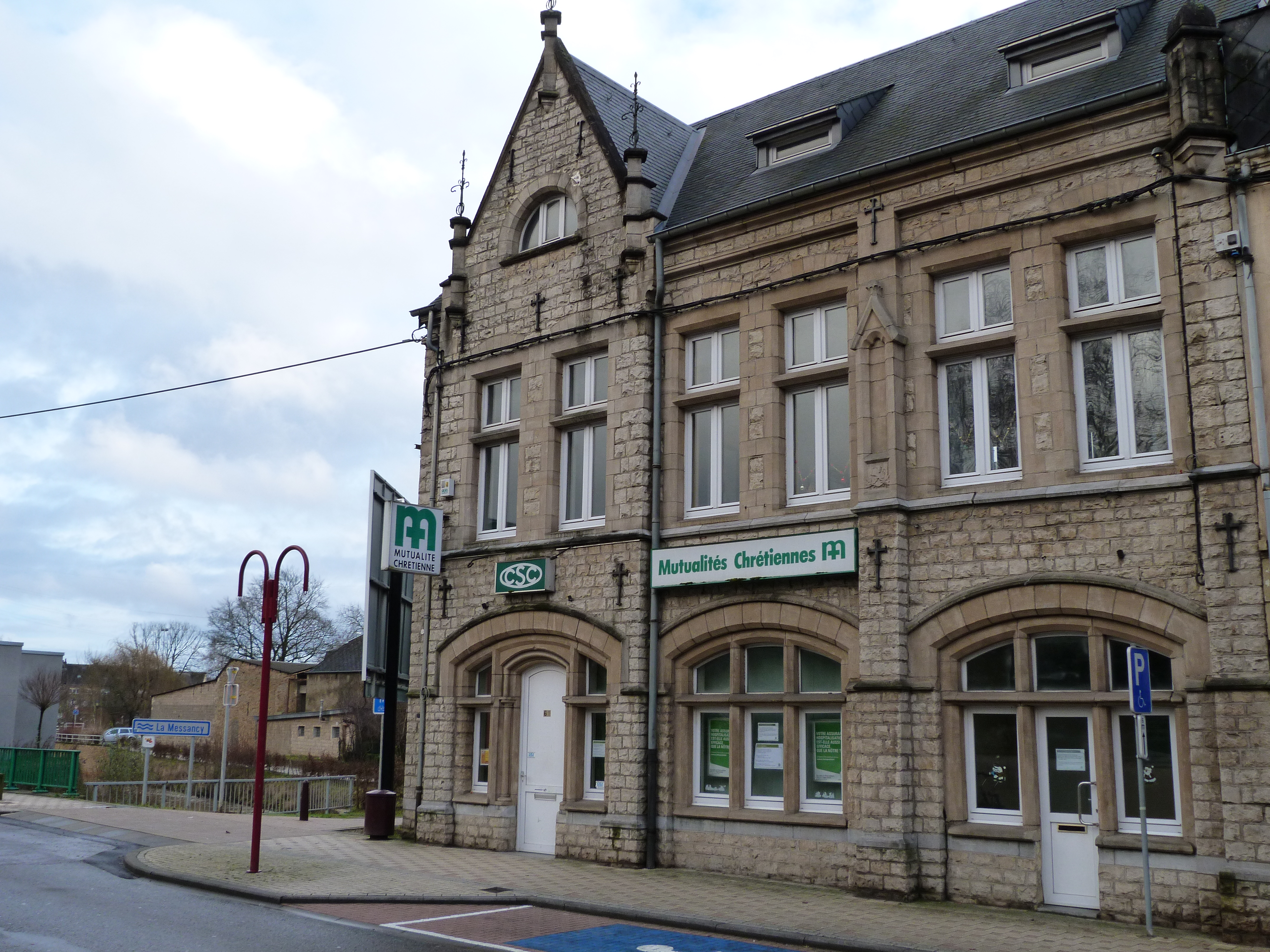 L'ancien Hotel de ville de la commune d'Athus, Grand Rue